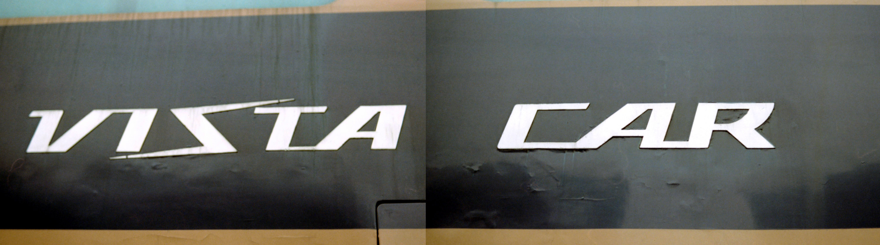 近畿 １０１００ 「VISTA CAR」ロゴ（２枚の写真を切り張り）